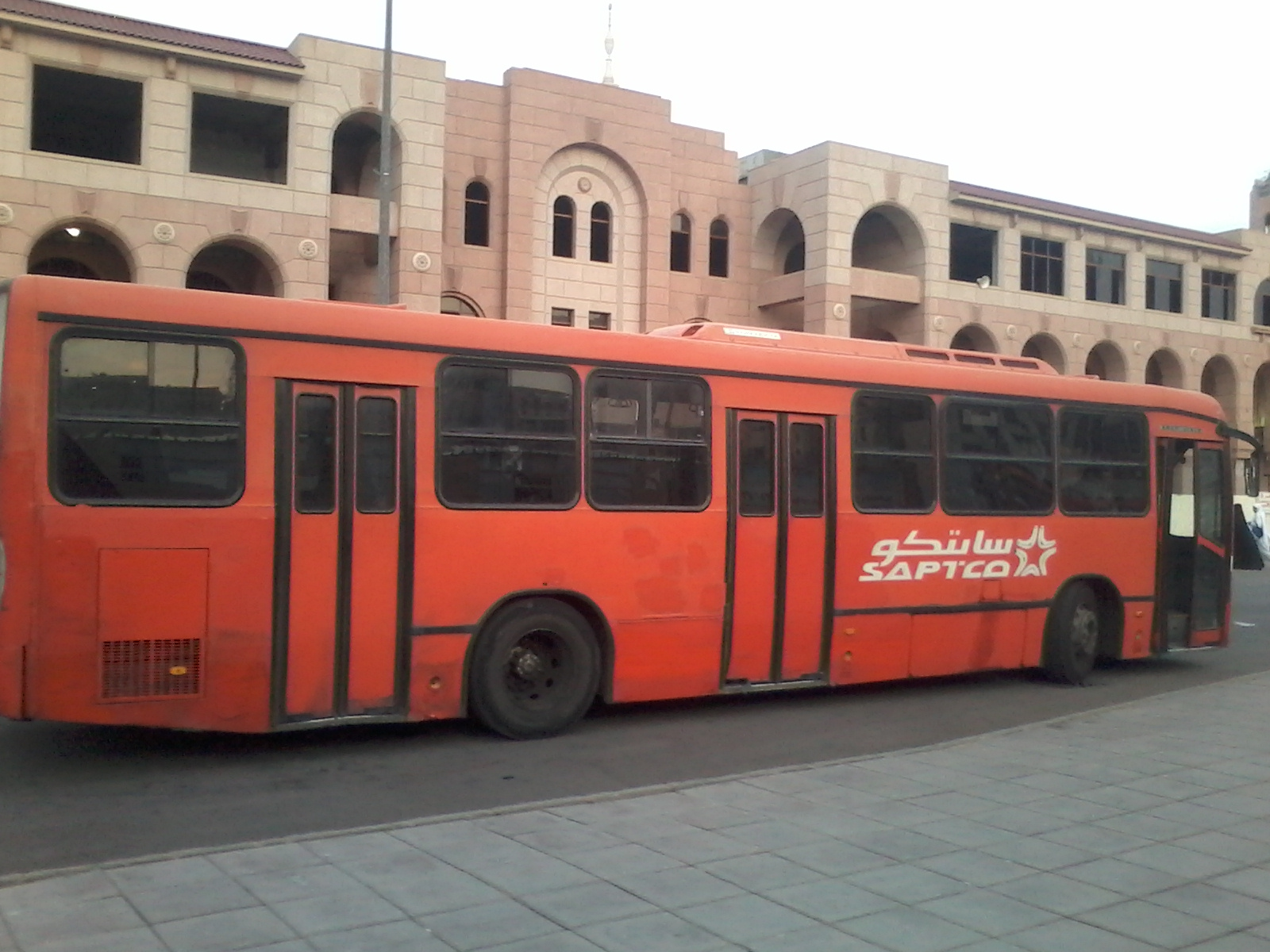 Bus SAPTCO Koridor Saqifah Bani Sa'idah - Jalan Raya Tabuk